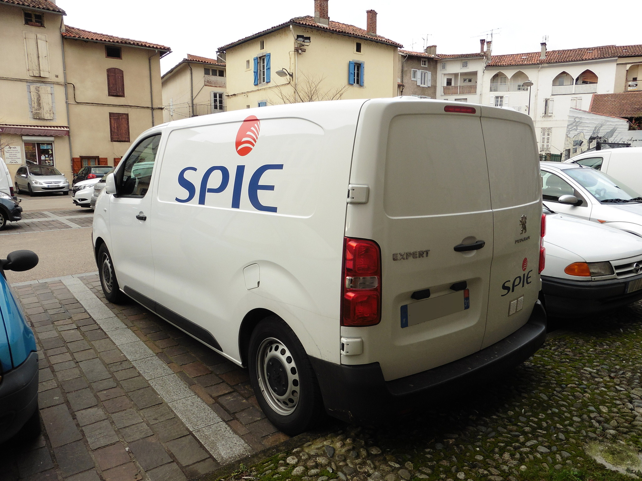 2016 Peugeot Expert.